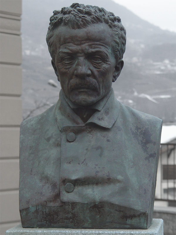 Description Busto di Maurizio Quadrio (1800-1876). Date February 13, 2006 Location Chiuro, Sondrio - Italy Photographer Franco Folini